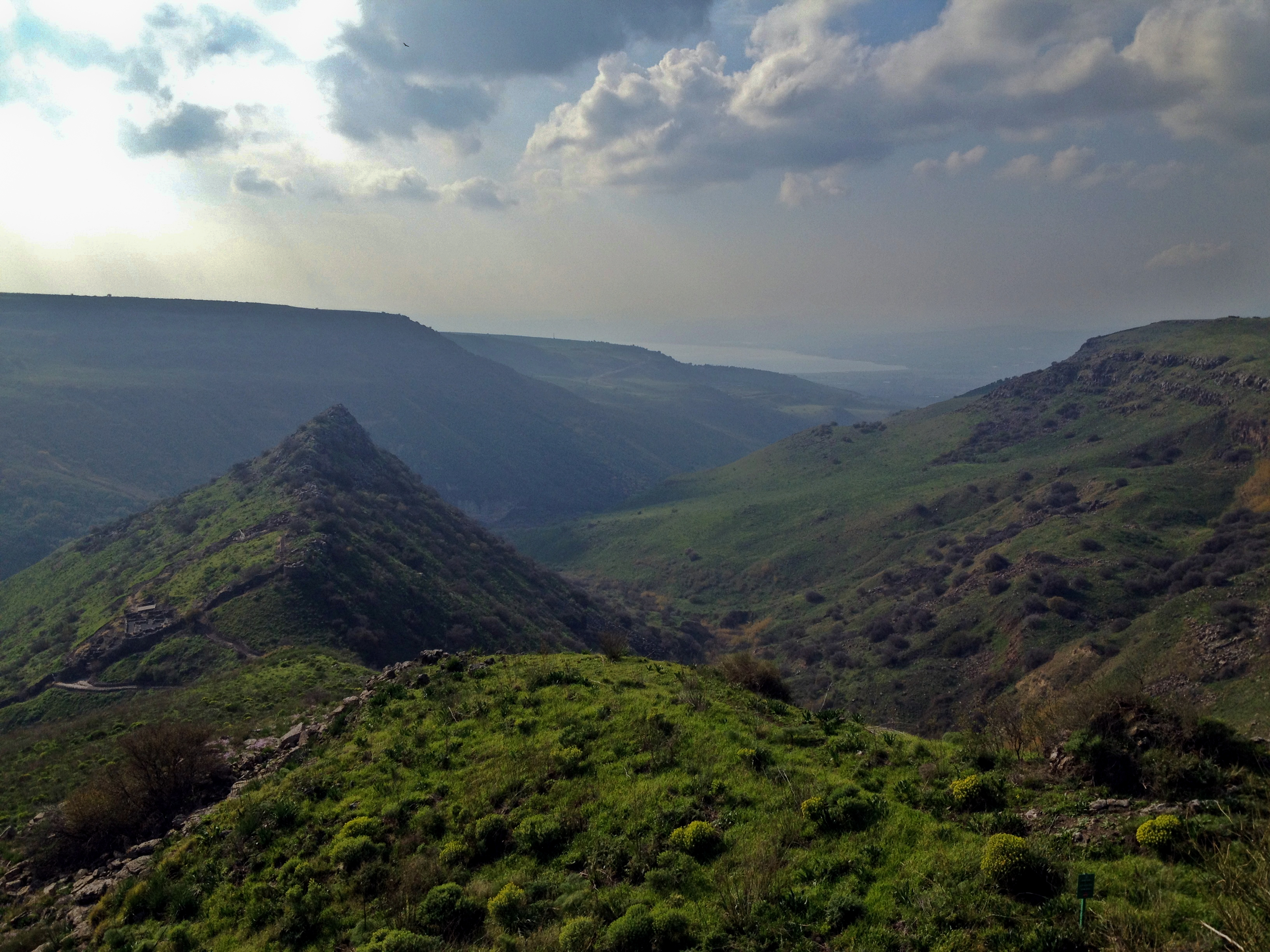 גמלא הייתה עיר ברמת הגולן שחרבה במרד הגדול בסוף ימי הבית השני